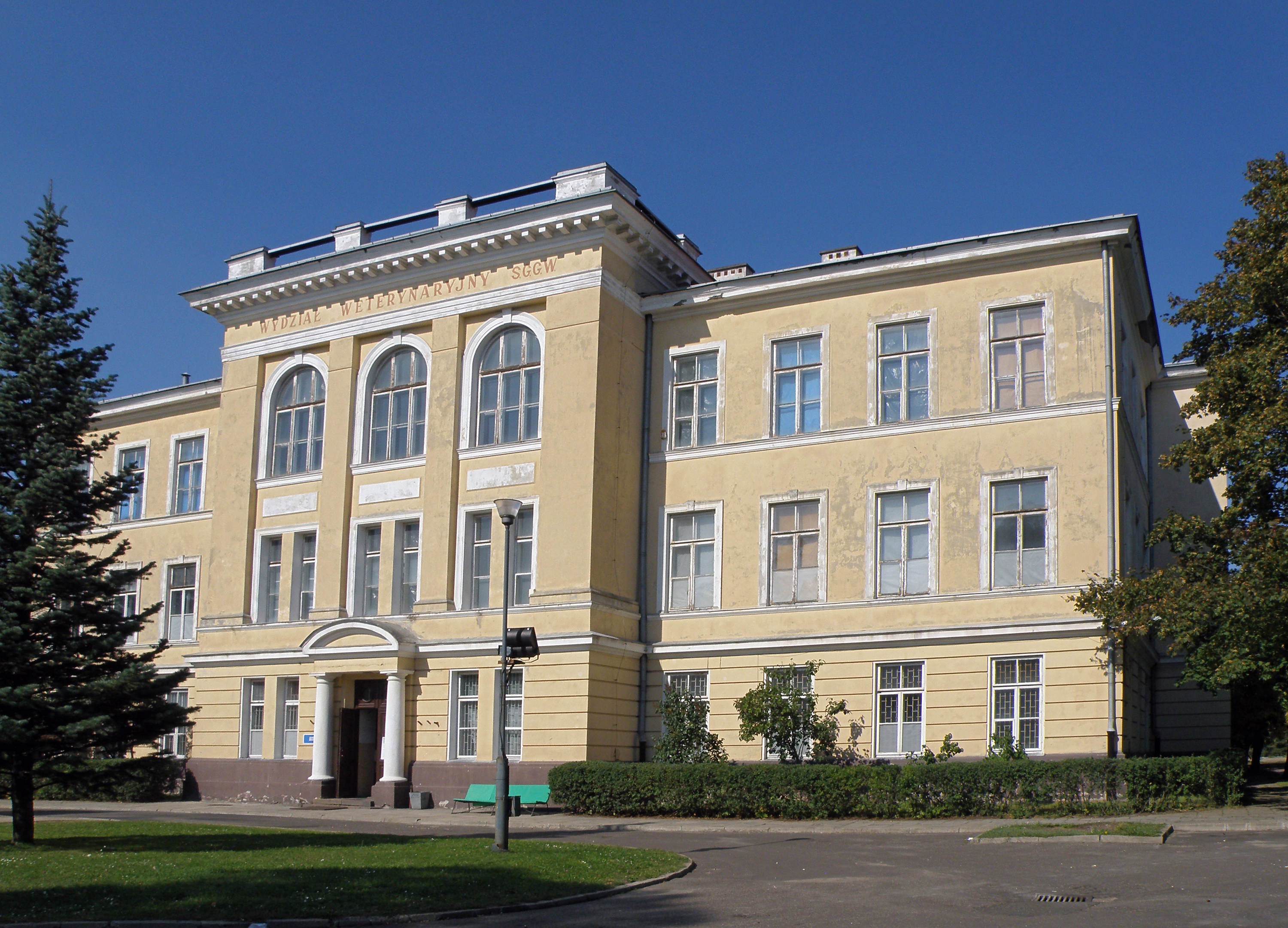 Instytut Weterynarii (1898-1900) – budynek główny (A-789 z 22.01.2008) ul. Grochowska 272, Warszawa.